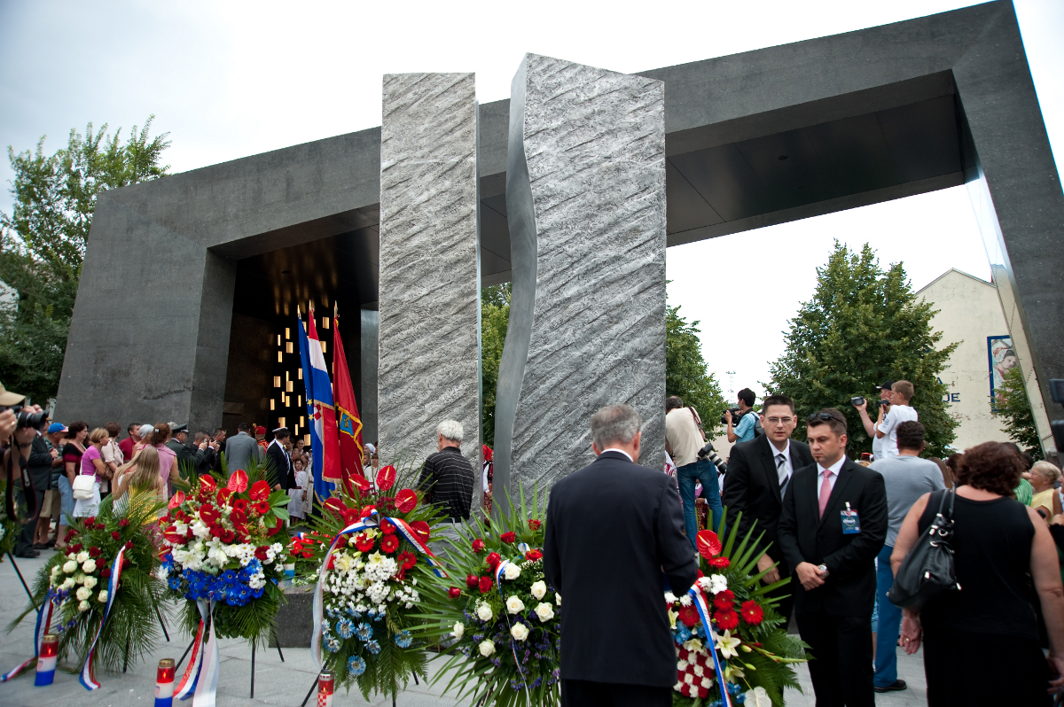 16. obljetnica vojnoredarstvene operacije Oluja